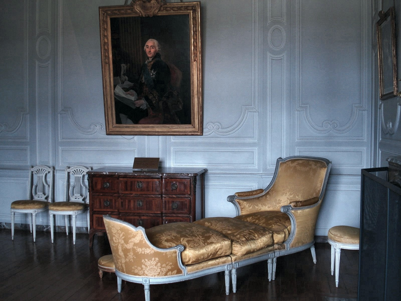 Schloss Vaux-le-Vicomte, Innenansicht